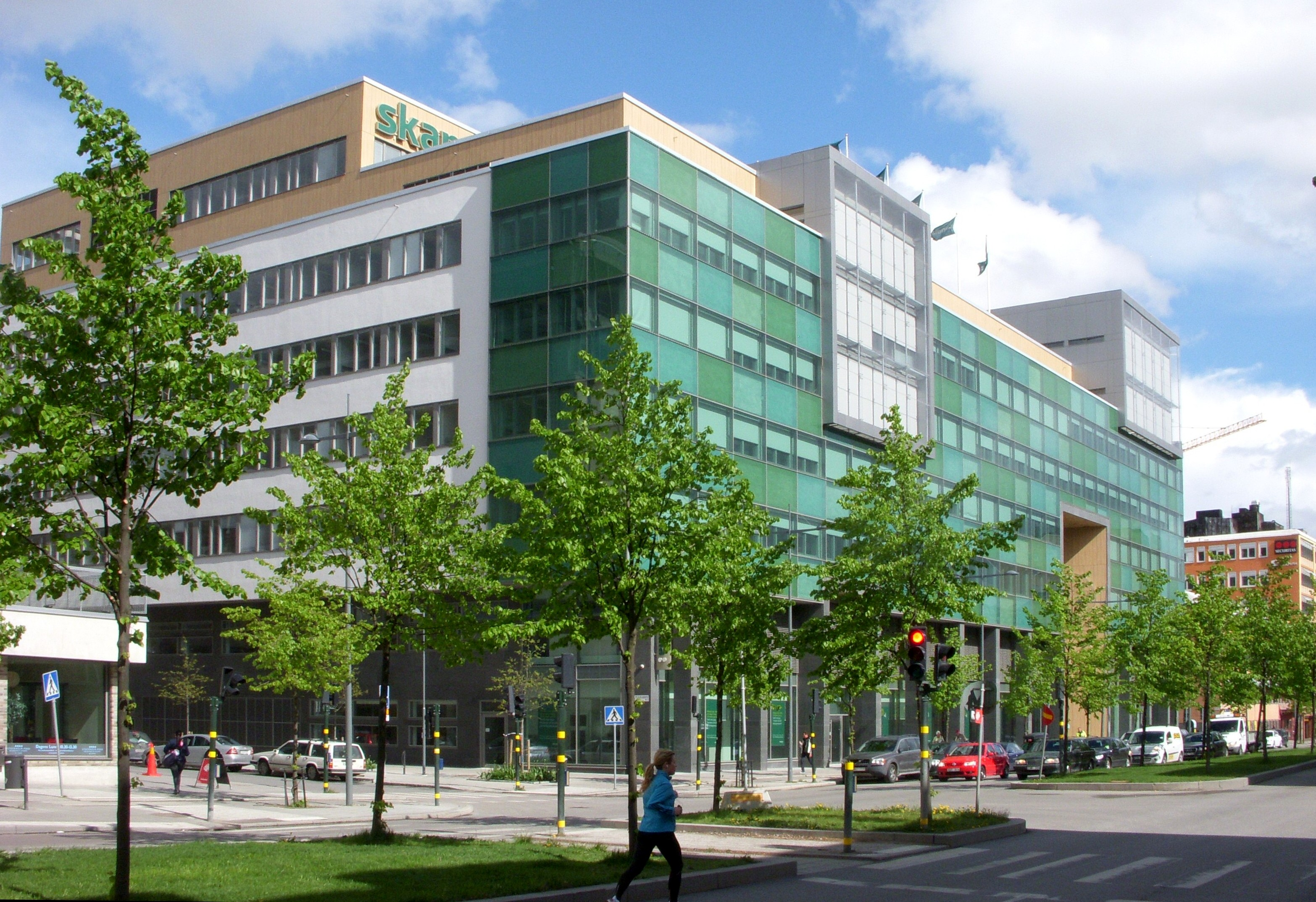 Gångaren 11, kontorshus på Kungsholmen, nominerat till "Årets Stockholmsbyggnad 2011", arkitekt: Brunnberg & Forshed Arkitekter